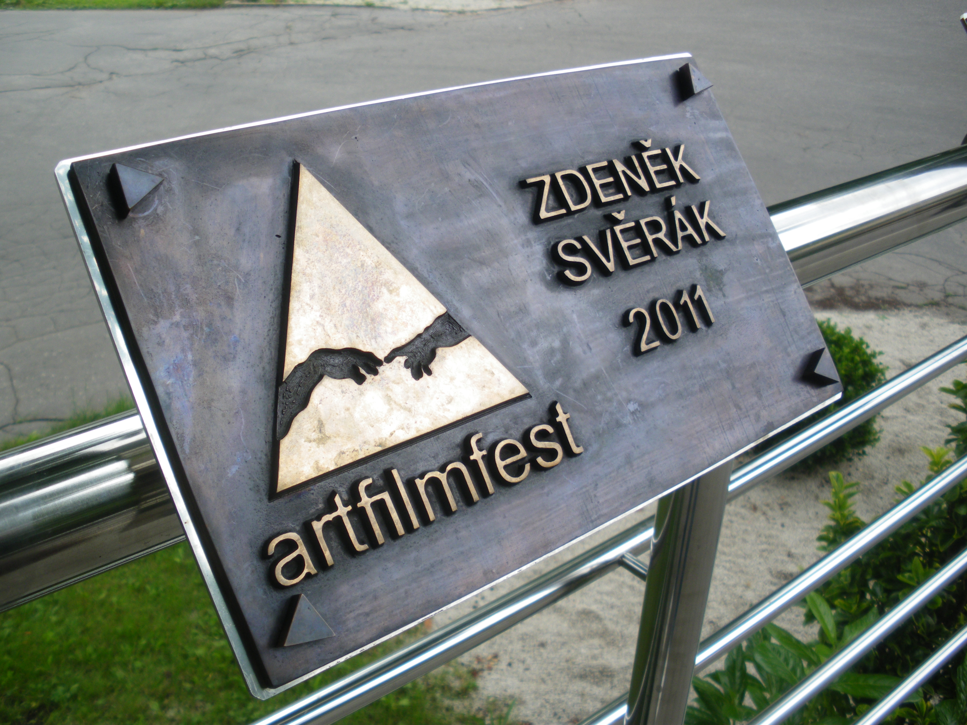 19. 6. 2011. Mosadzná plaketa: „HERCOVA MISIA“ (Actor‘s Mission Award). Medzinárodný filmový festival Art Film Fest, Trenčianske Teplice.